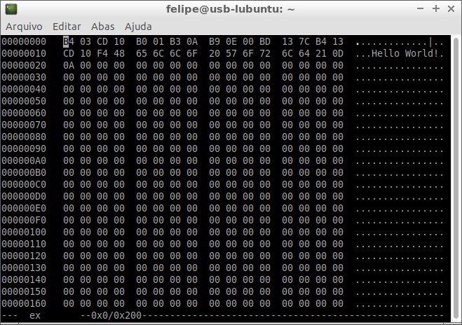 Print screen do programa hexedit rodando sobre o Terminal do sistema operacional Lubuntu.